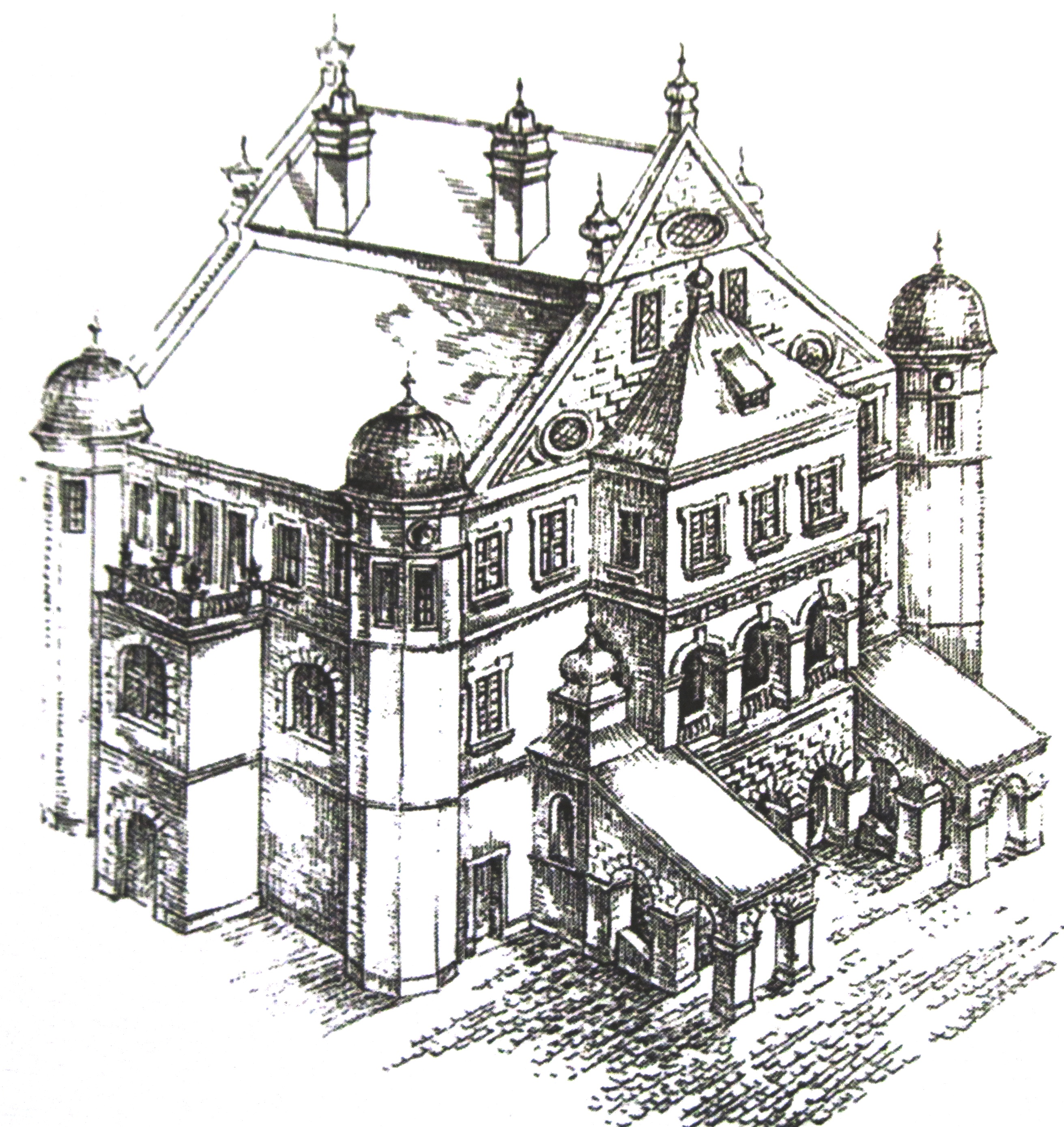 Беларуская (тарашкевіца): Рэканструкцыя палацу М.К. Радзівіла Сіроткі. 16 ст.